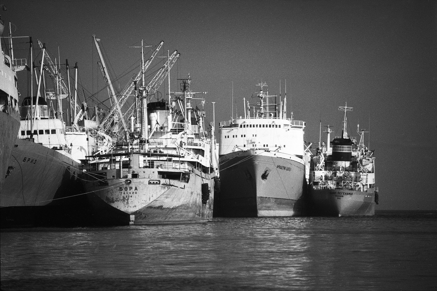 Külmutuslaevad "Бриз", "Bora", "Fryderyk Chopin" ja "Ханс Пегельман" Paljassaare sadamas 79